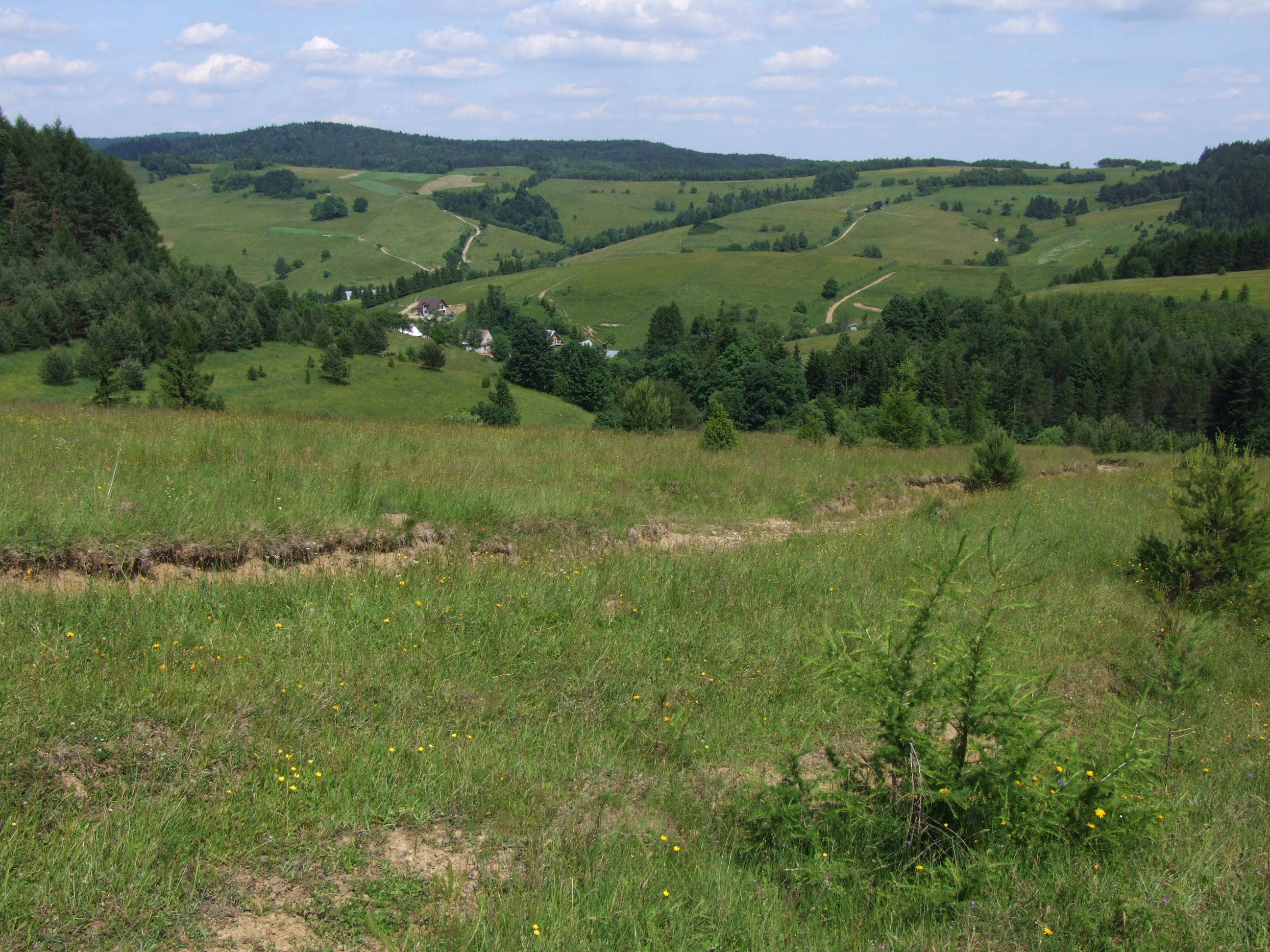 Wojkowa i dolina Potoku Wojkowskiego. Powyżej zalesiony grzbiet z wierzchołkiem Pusta